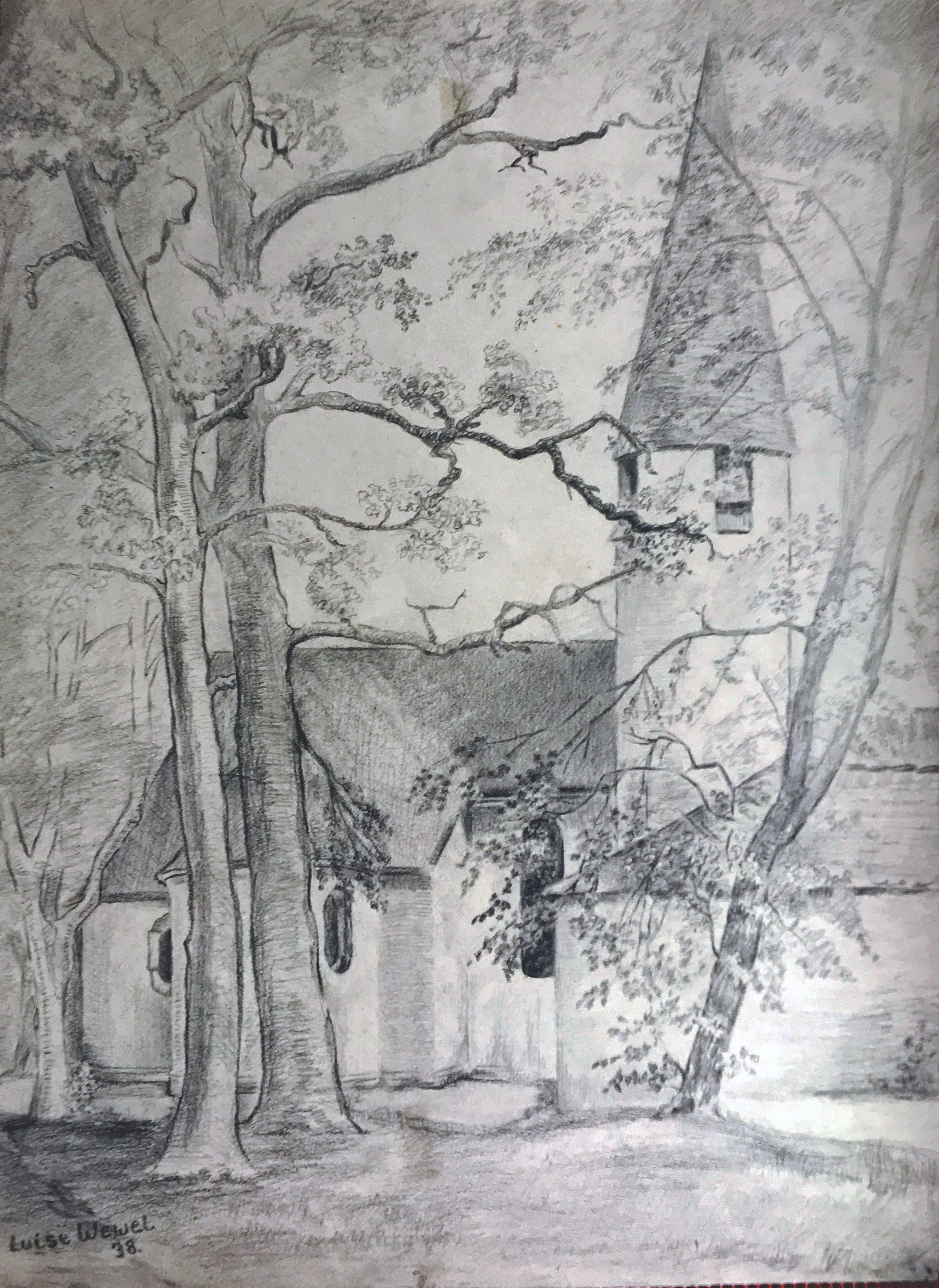 Eigenes Foto einer im Familienbesitz befindlichen Zeichnung meiner 1892 in Sanditten/Wehlau-Ostpreußen geborenen Tante, Schwester meines Vaters, Luise Wewel, Kunstmalerin, Autodidaktin. Entstanden 1938 bei einem Besuch unserer Familie in Krailling